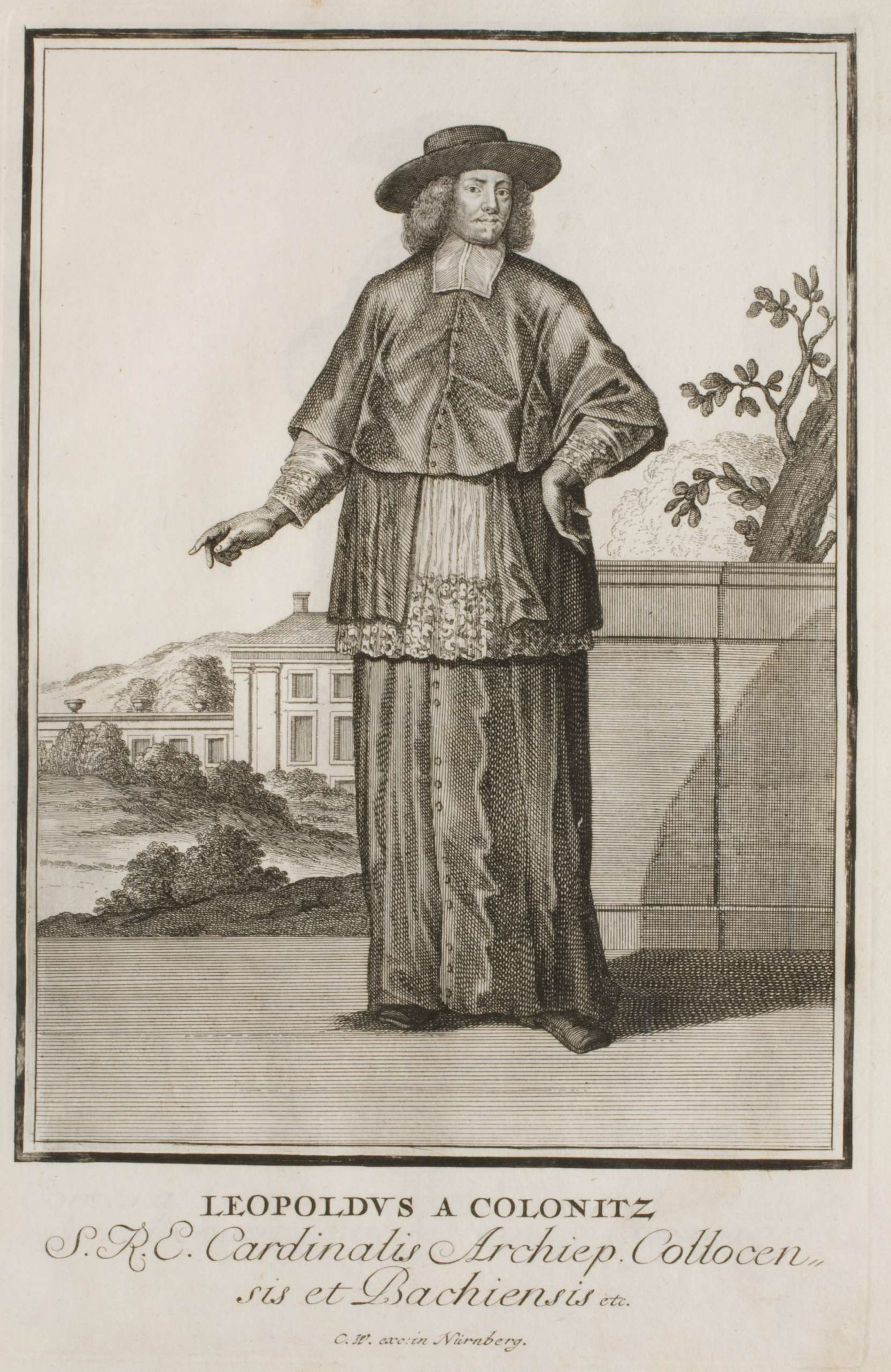 Neu-eröffnete Welt-Galleria. ..., Nürnberg 1703. 12. Leopoldus A Colonitz. S. R. E. Cardinalis Archiep. Collocensis et Bachiensis etc.